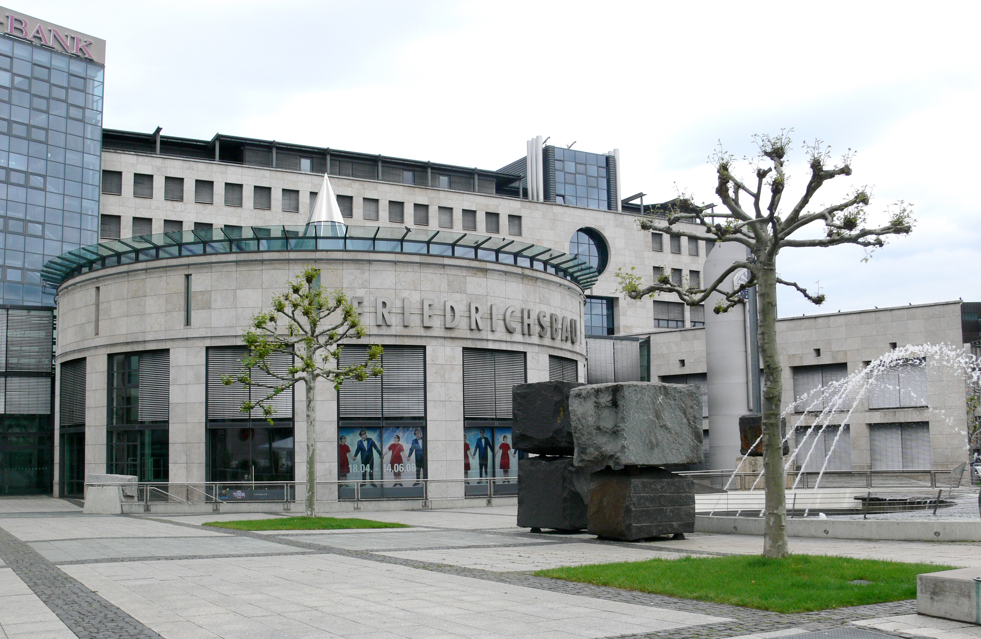 Friedrichsbau Stuttgart, Rotunde mit Vorplatz